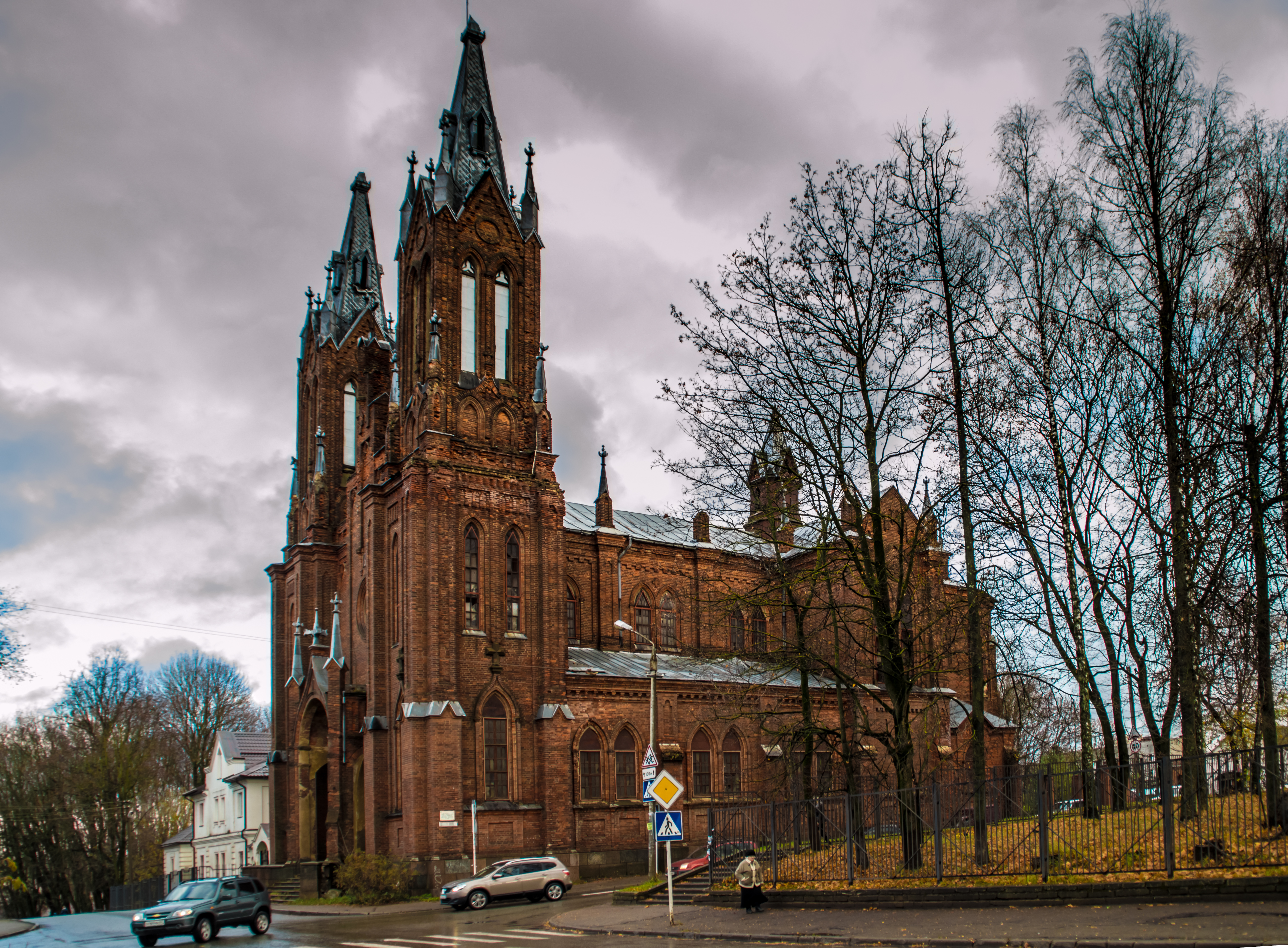 Польский костел (Смоленская область, Смоленск, улица Урицкого, 8)